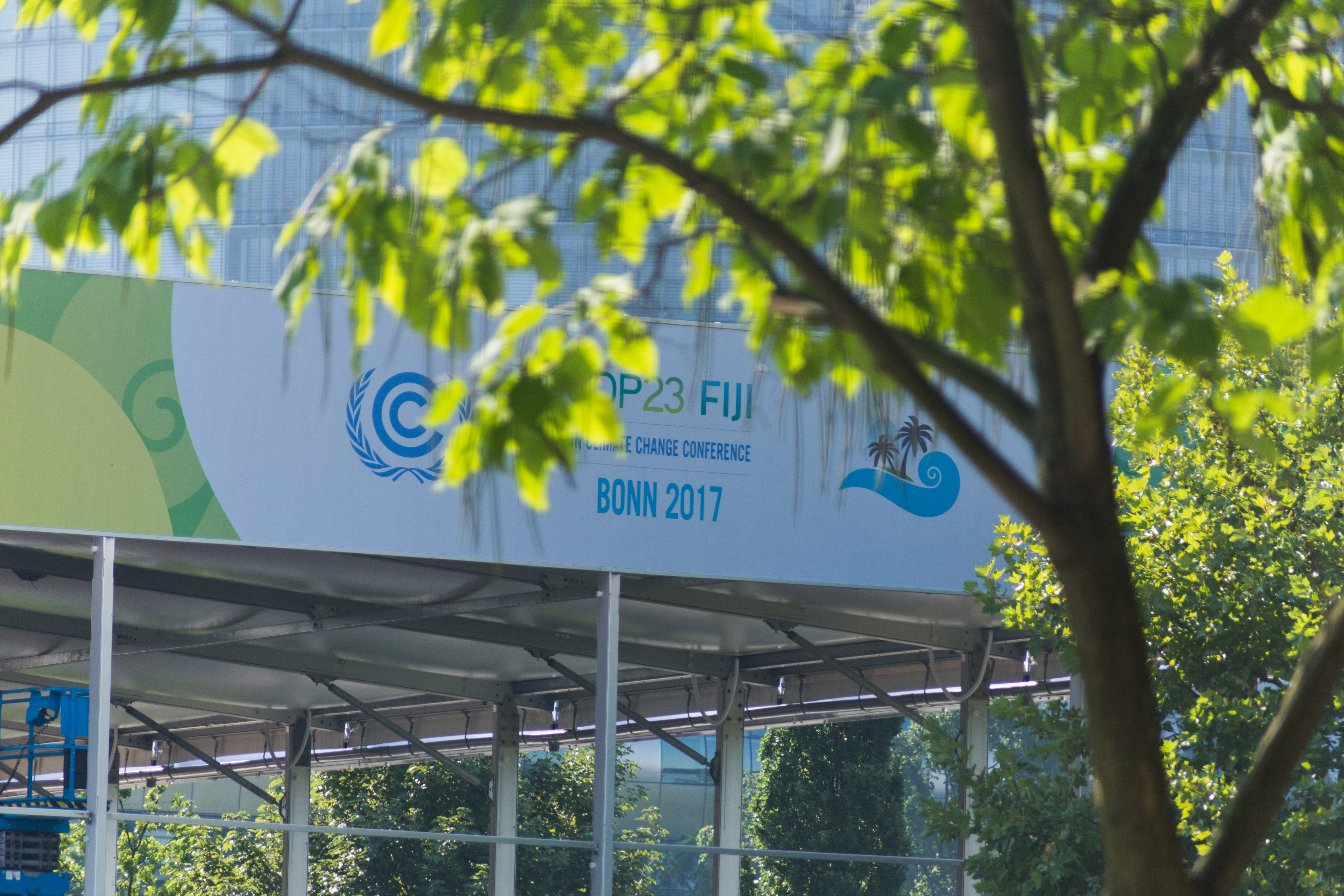 Aufbau der Zeltstadt für den Weltklimagipfel 2017 (COP23).